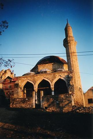 Dzamija u staroj carsiji Balagusa